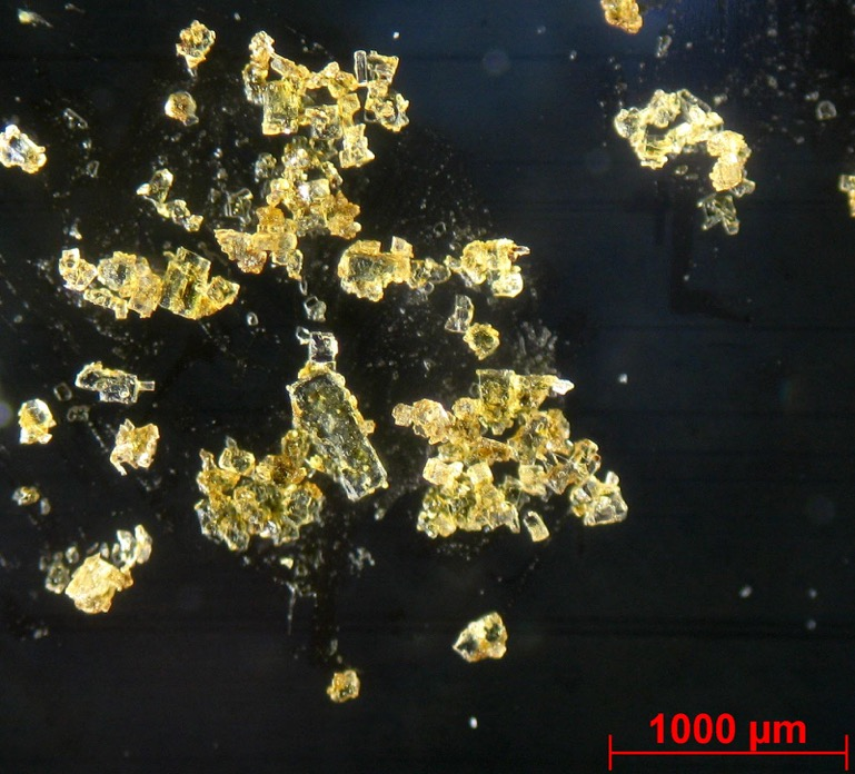 Фульвовая кислота под электронным микроскопом, 1000нм